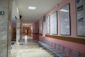 Холл первого этажа лицея №1580